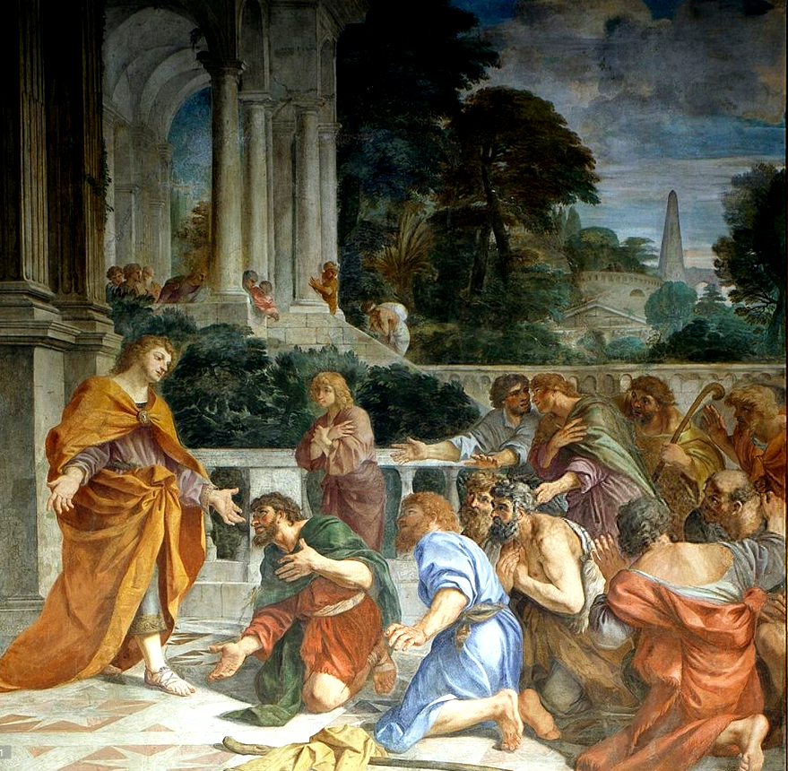 Giuseppe si fa riconescere dai fratelli